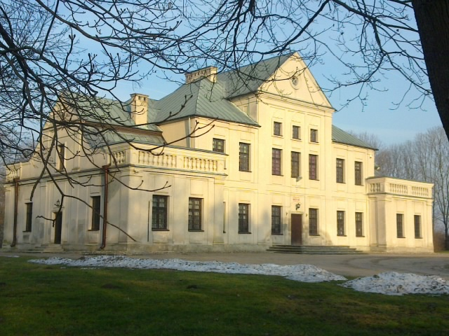 Srebrzyszcze - XVII wieczny dwór obronny Serebryskich, otoczony ponad 100 hektarowymi bagnami.